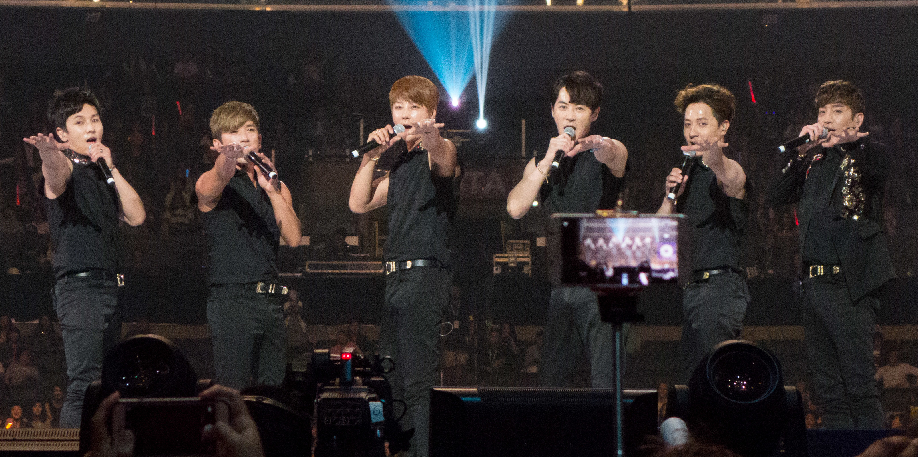 KCON 2015